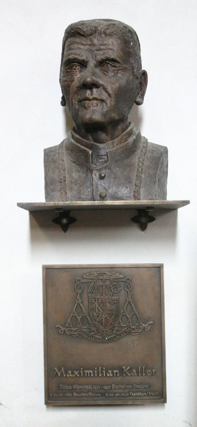 Büste von Maximilian Kaller im Frauenburger Dom